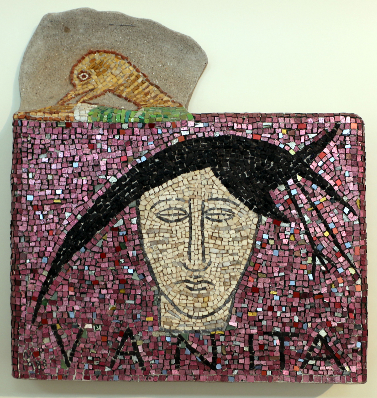 Collezione Mosaici Moderni - NB: Museum explicitly authorized the upload of its contemporary art collection for WLM 2016 (for further info ask WLM Italy organizators). This is a photo of a monument which is part of cultural heritage of Italy.